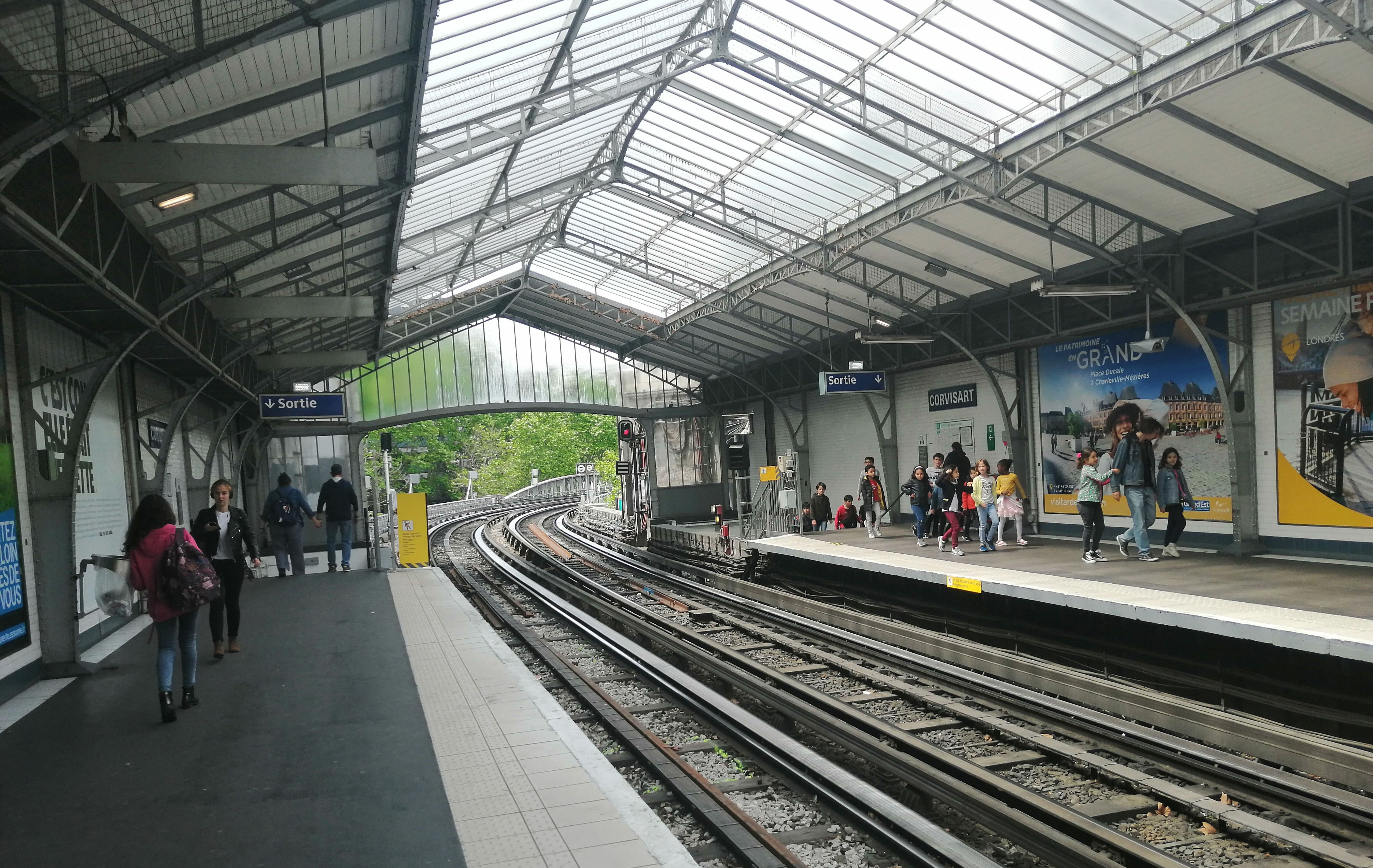 Estación de metro de Corvisart en París